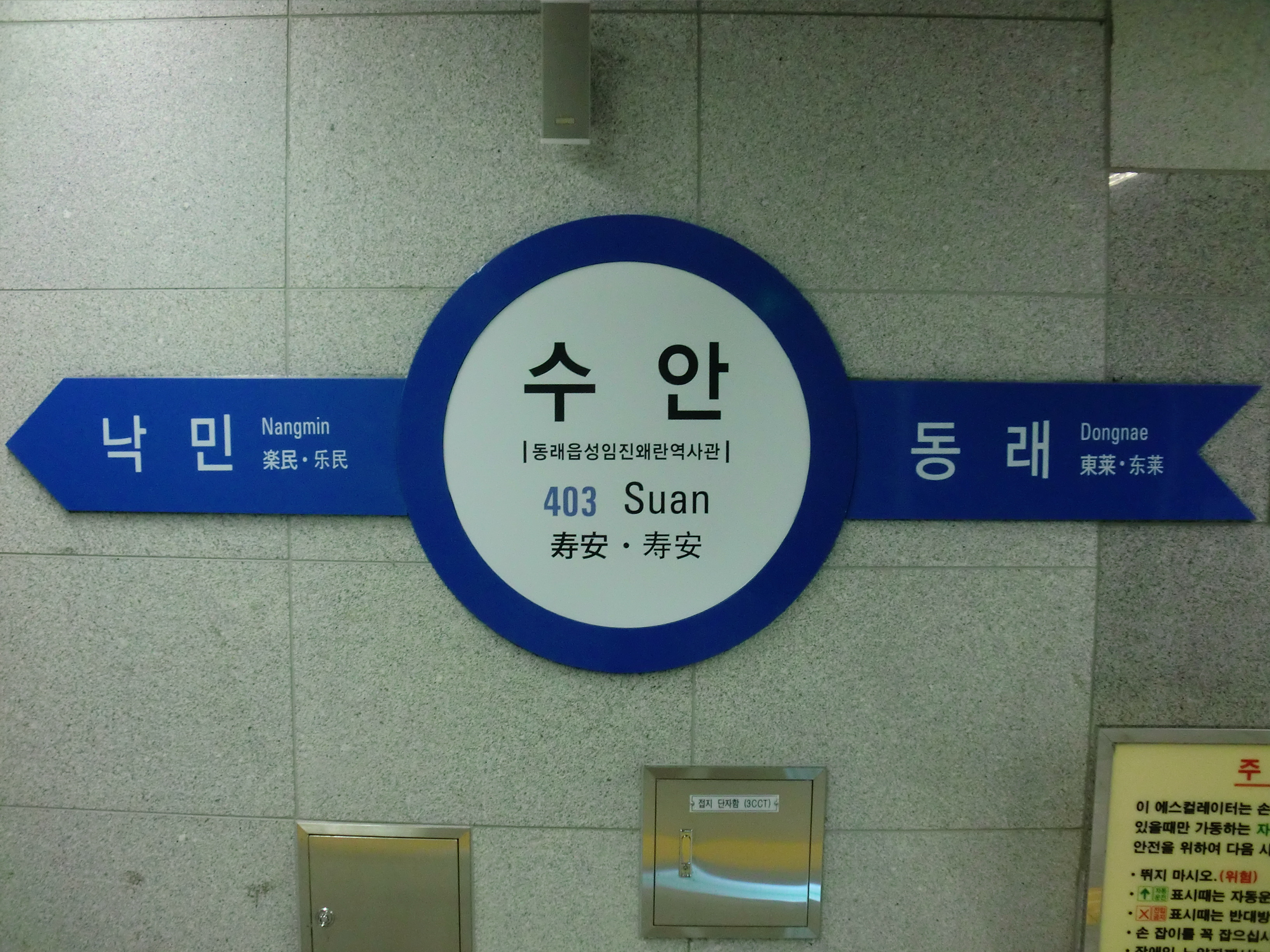 부산도시철도 수안역의 역명판